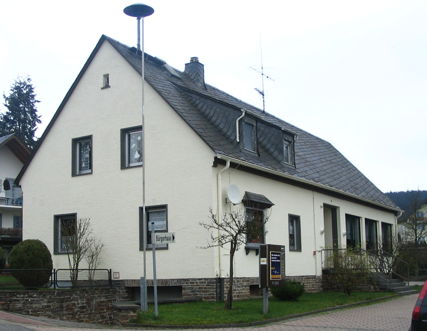 Bürgerhaus in Schauren bei Blankenrath im Hunsrück